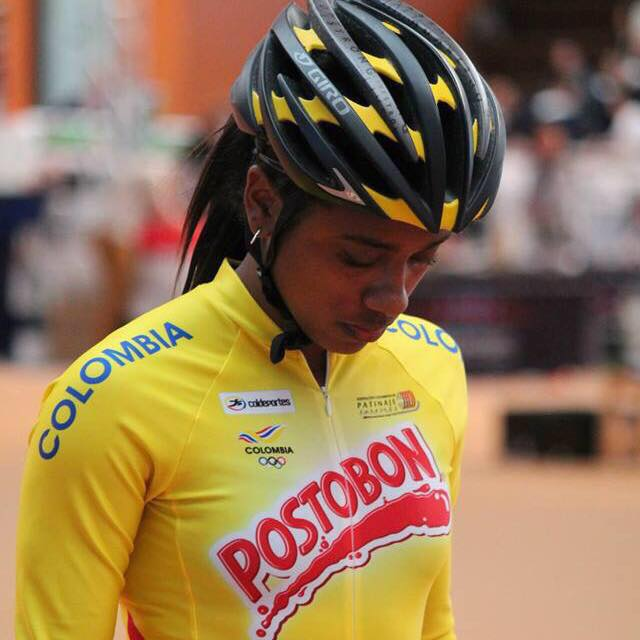 Concentrada antes de una competencia.